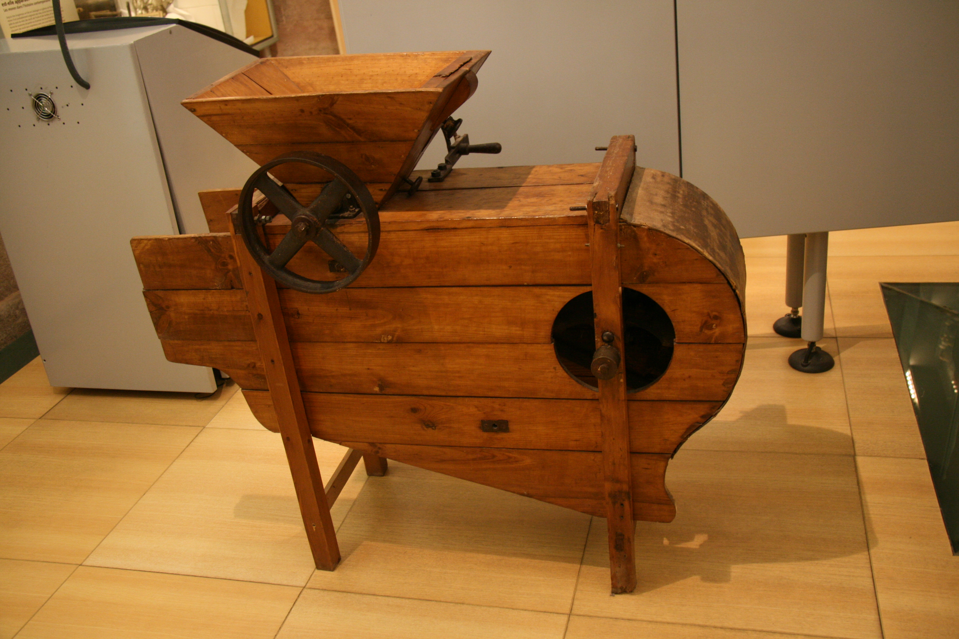 Descascarillador